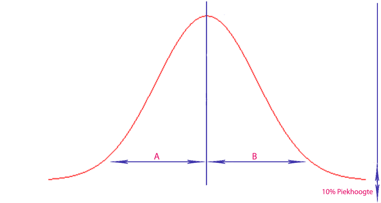 Symmetriefactor